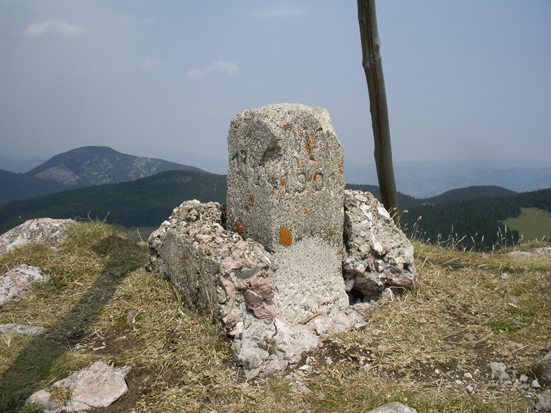 A Nagy-Hagymás csúcspontja 1792 m